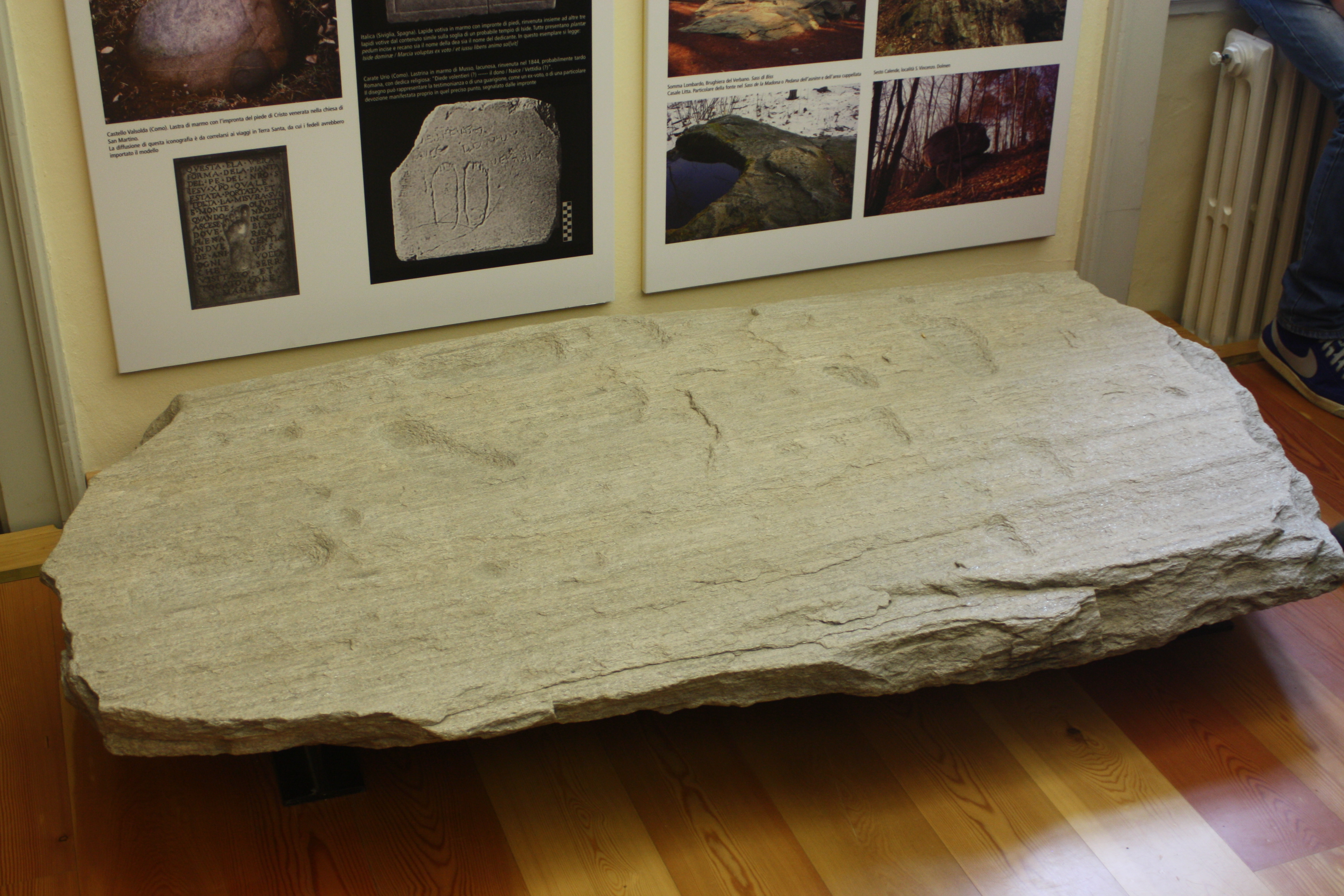 lastrone di pietra con incisioni, Museo di Villa Mirabello